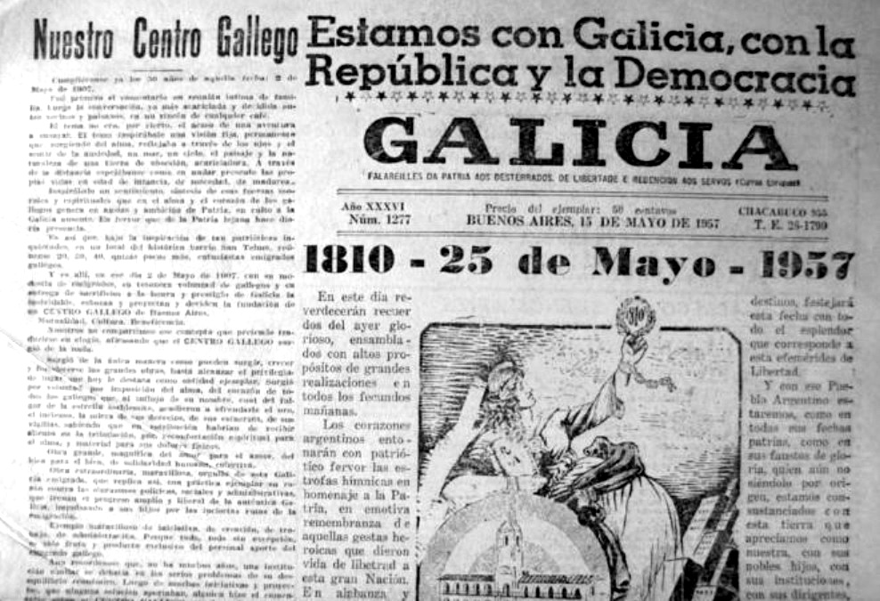 Galicia Publicación semanal editada por la Federación de Sociedades Gallegas. Portavoz de la Federación de Sociedades Gallegas. Chacabuco, 955. Buenos Aires. Argentina (1930 - )